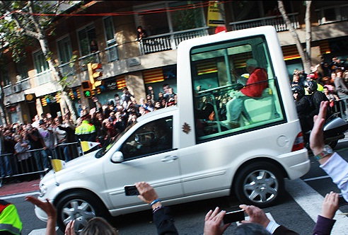 Imatge retallada del papamòbil a la dreta de l'Eixample de Barcelona.